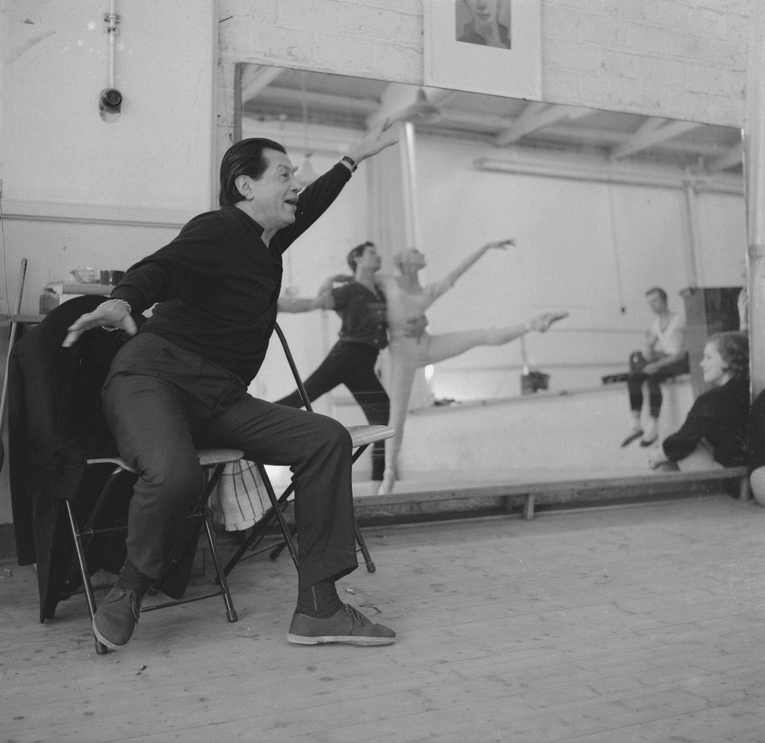 Collectie / Archief : Fotocollectie Anefo Reportage / Serie : [ onbekend ] Beschrijving : Serge Lifar bij repetitie van Nederlands Ballet Datum : 19 maart 1961 Trefwoorden : BALLET, repetities Persoonsnaam : Lifar, Serge Fotograaf : Behrens, Herbert / Anefo Auteursrechthebbende : Nationaal Archief Materiaalsoort : Negatief (zwart/wit) Nummer archiefinventaris : bekijk toegang 2.24.01.03 Bestanddeelnummer : 912-2425